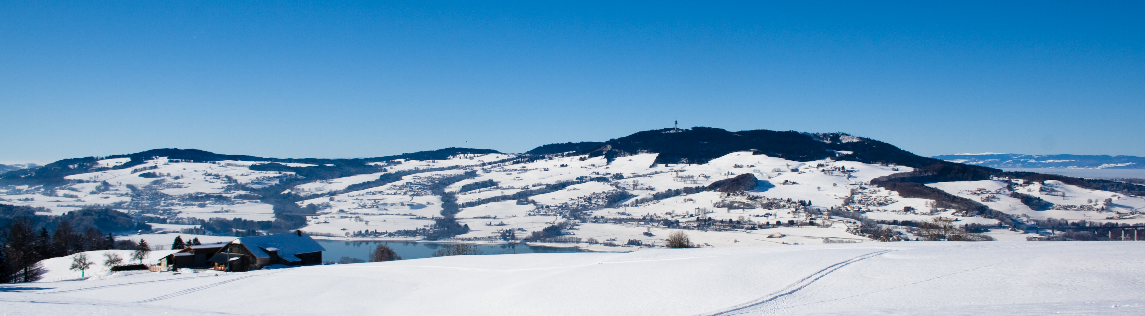 Le Gibloux en hiver, vu depuis La commune de Hauteville. La ferme est au lieu-dit Le Mont